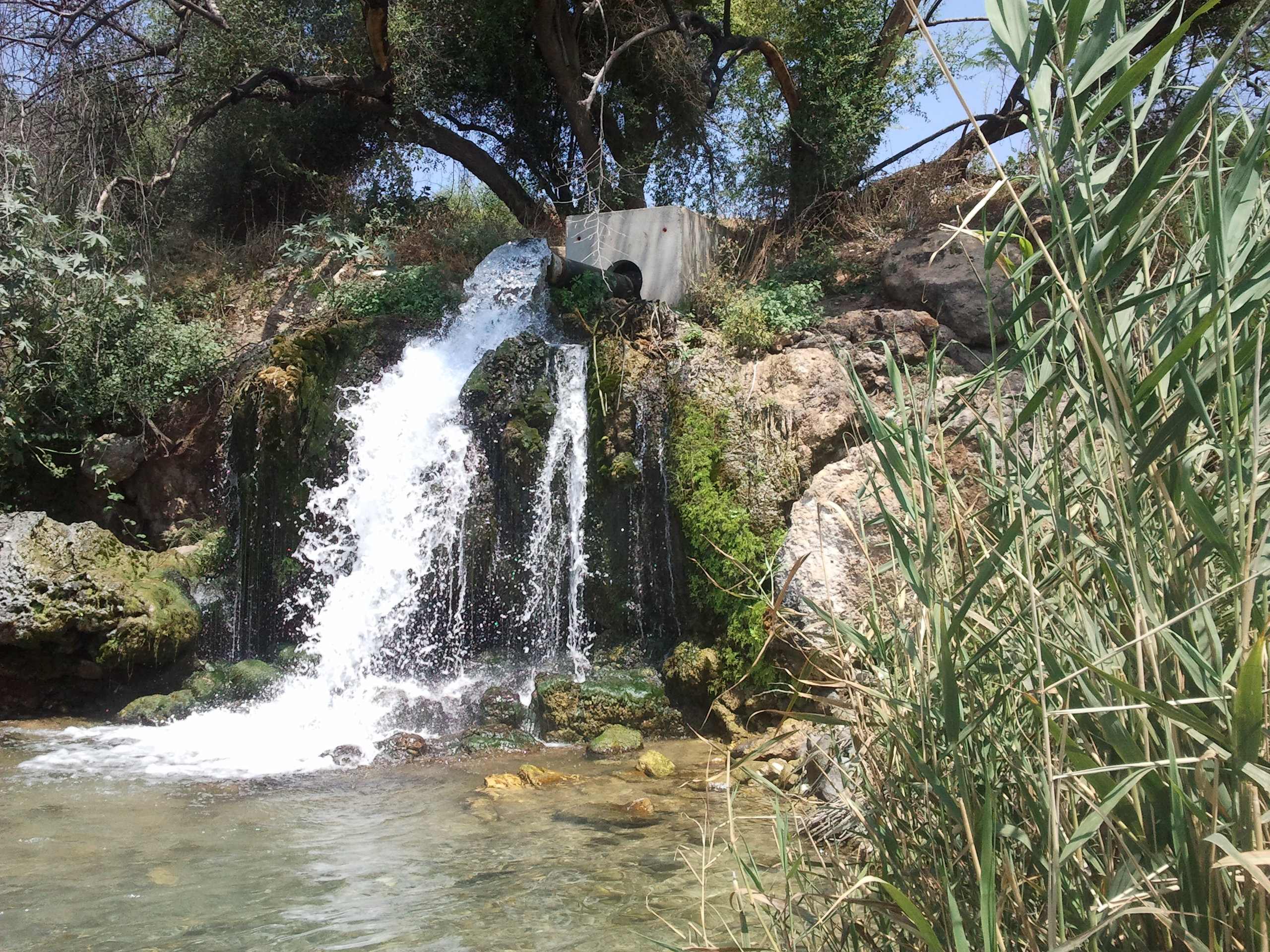 Ein Eyov, Spring near Capernaum Israel עין איוב, מעיין ומפל ליד הכנרת, ליד הגן הלאומי כפר נחום